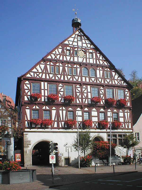 Rathaus in Beilstein (Baden-Württemberg), Deutschland, erbaut zu Beginn des 18. Jahrhunderts nach Zerstörung der Stadt 1693